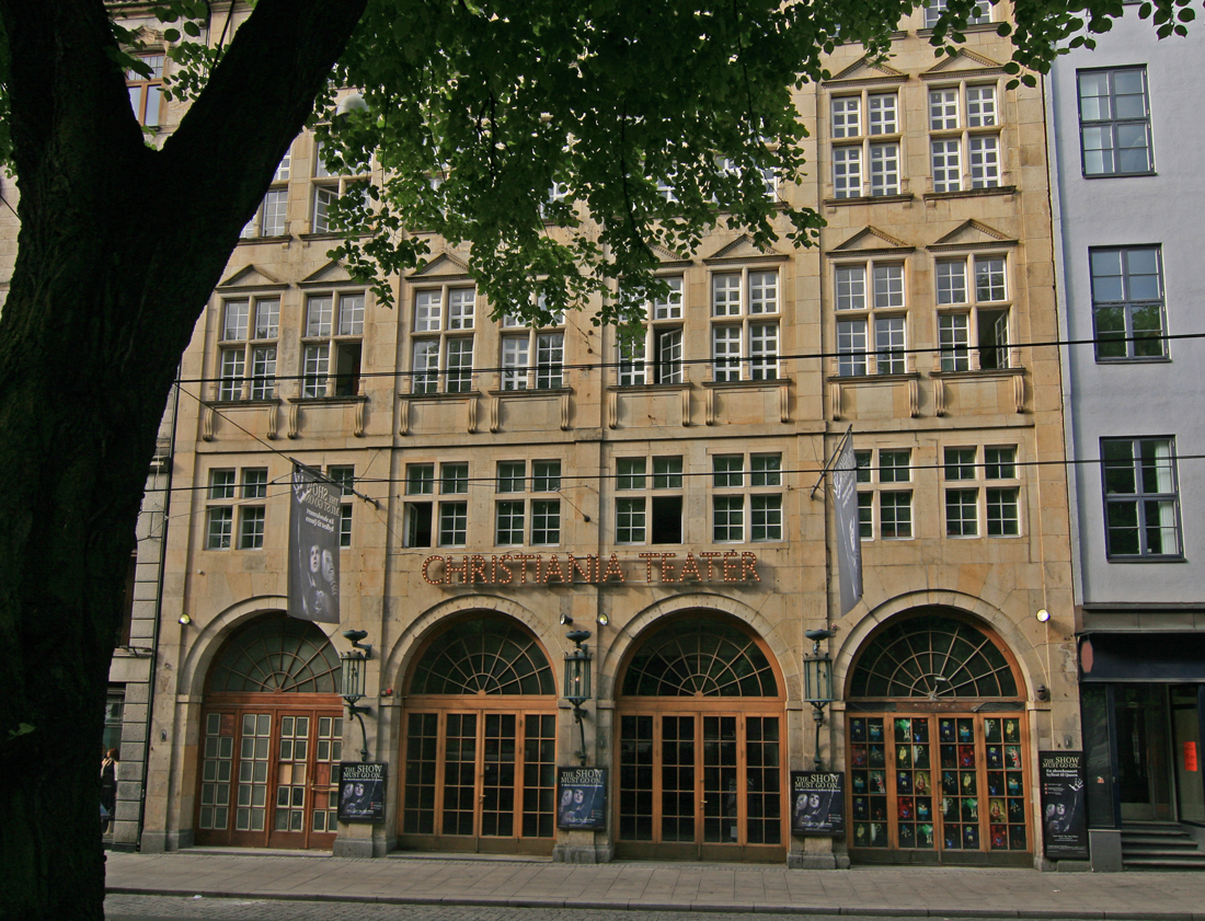 Stortingsgata 16, Oslo. Forretningsgård bygd 1918; arkitekt Henry Coll.